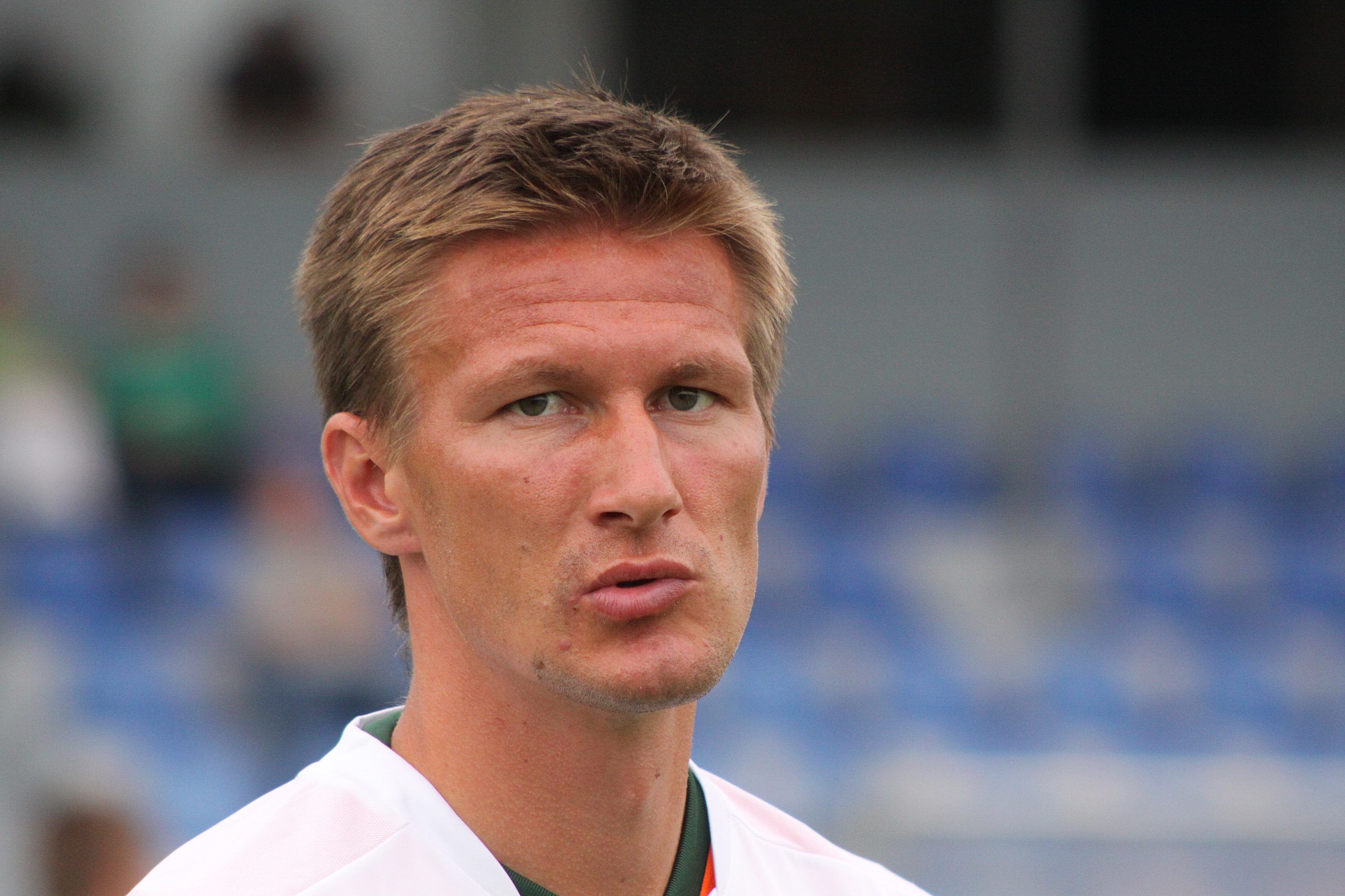 Jurica Vranješ - SV Werder Bremen (2)